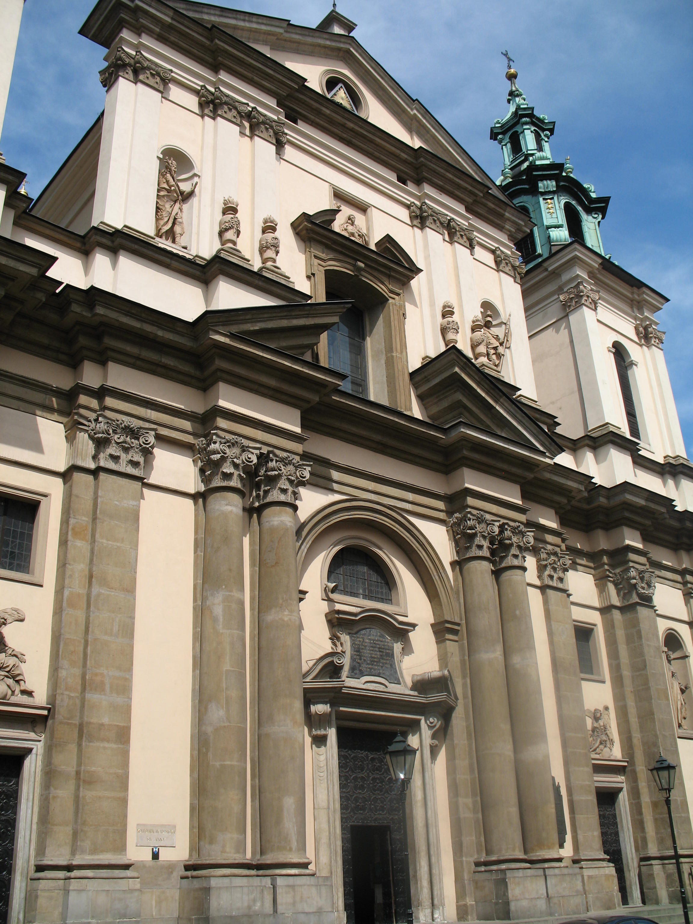 St. Anne in Kraków, Poland